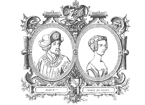 Jan I. Bourbonský s chotí Marií